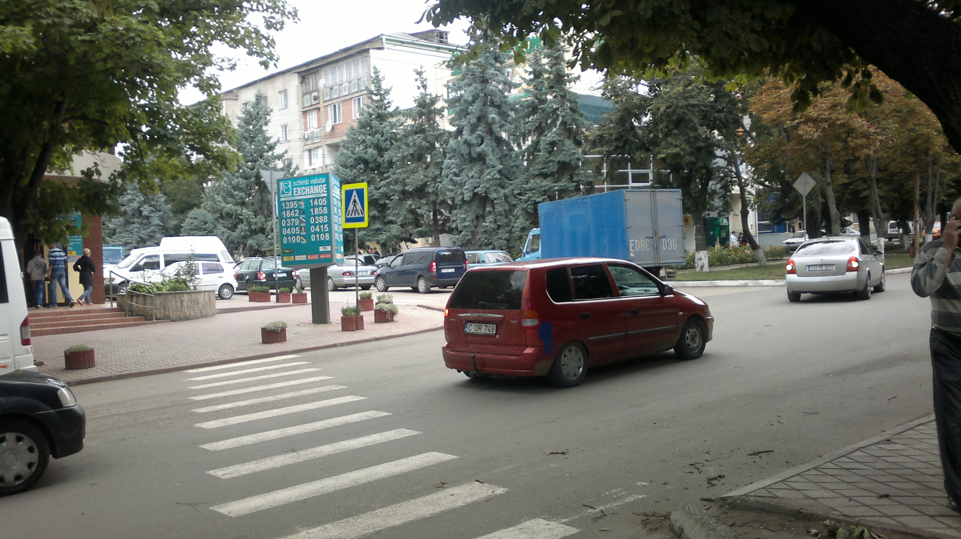 Intersecție în centrul orașului Edineț, Republica Moldova.